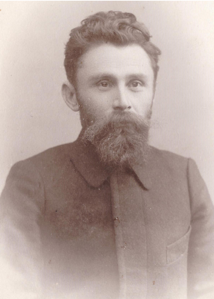 Фото начала 20-го века.